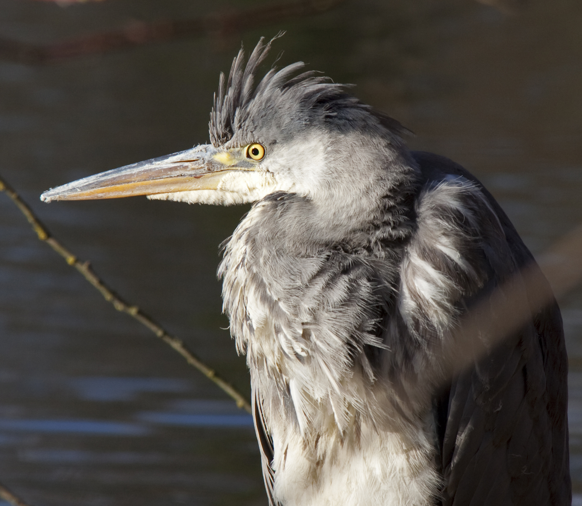 Heron